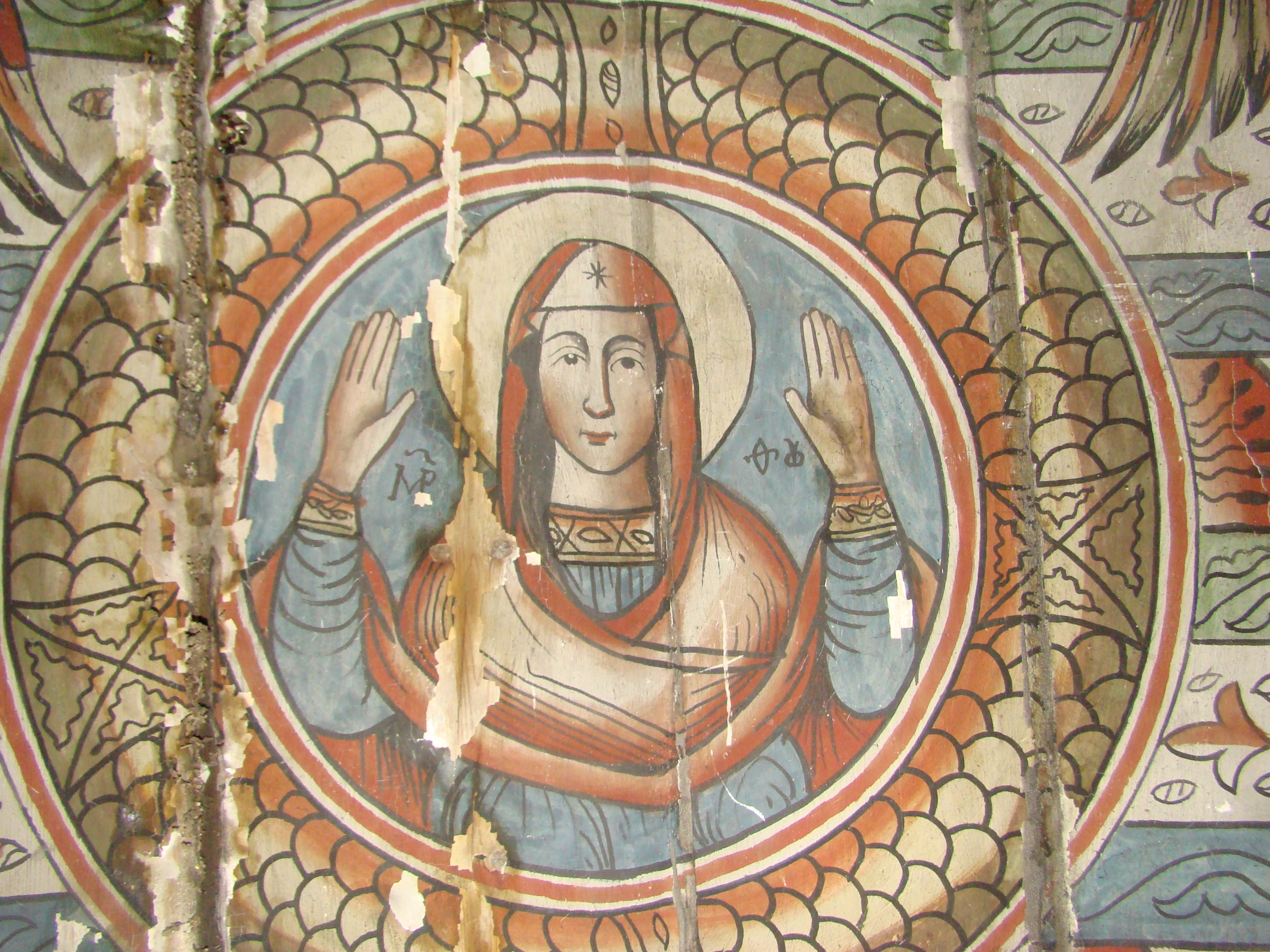 Biserica de lemn “Învierea Domnului” din Cubleșu, județul Sălaj